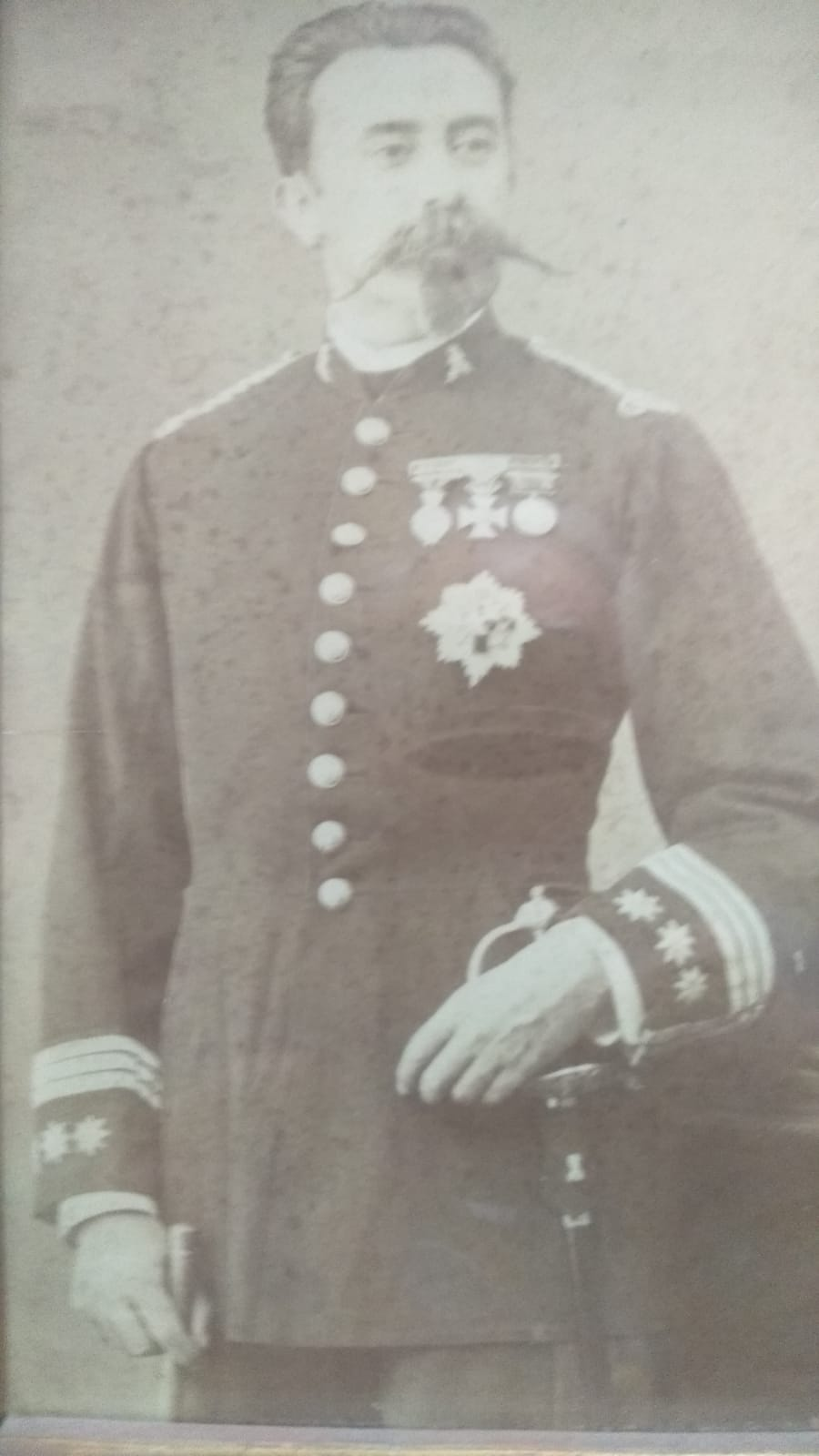 Retrato de Lope Maria Blanco de Cela con uniforme militar, tomada en 1880 y dedicada en el reverso a su madre Anselma